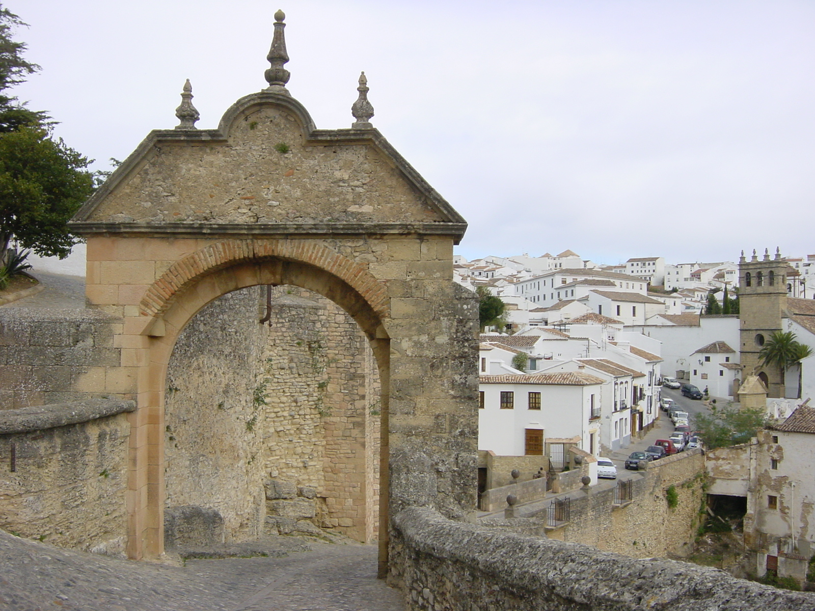 Ronda, Andalucía